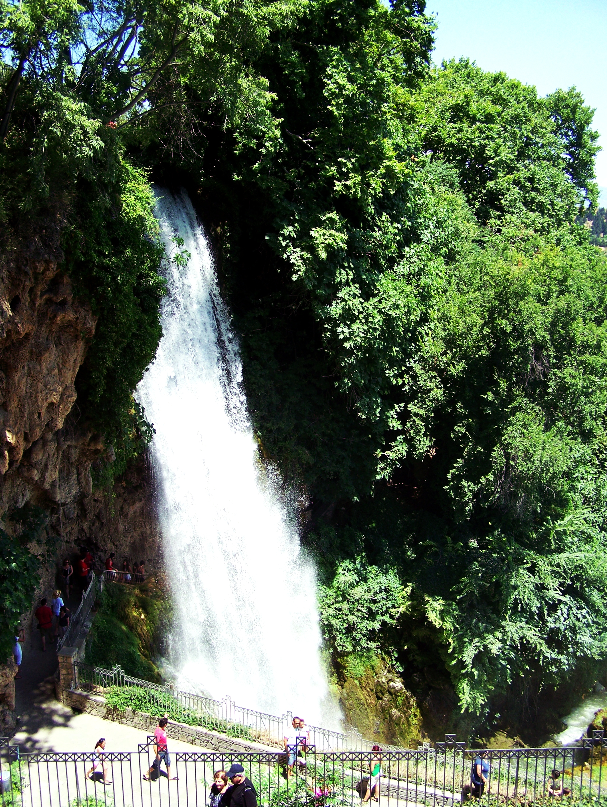 Cataracte à Edessa